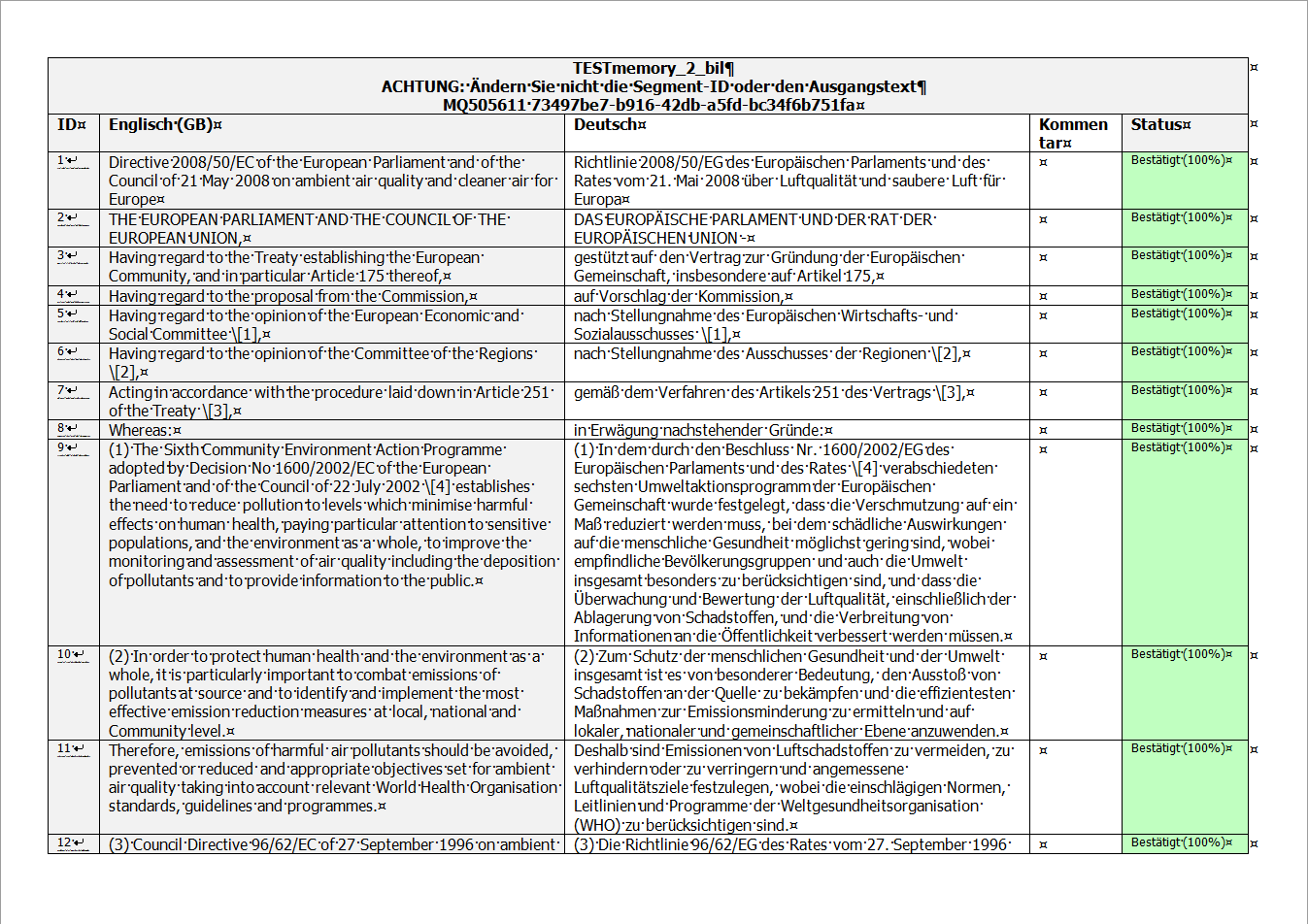 memoQ - Screenshot zweisprachige RTF-Datei